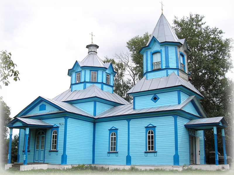 Церква Св. Духа ХІХ ст.: деревяна церква в с.Кувечичі Чернігівської області